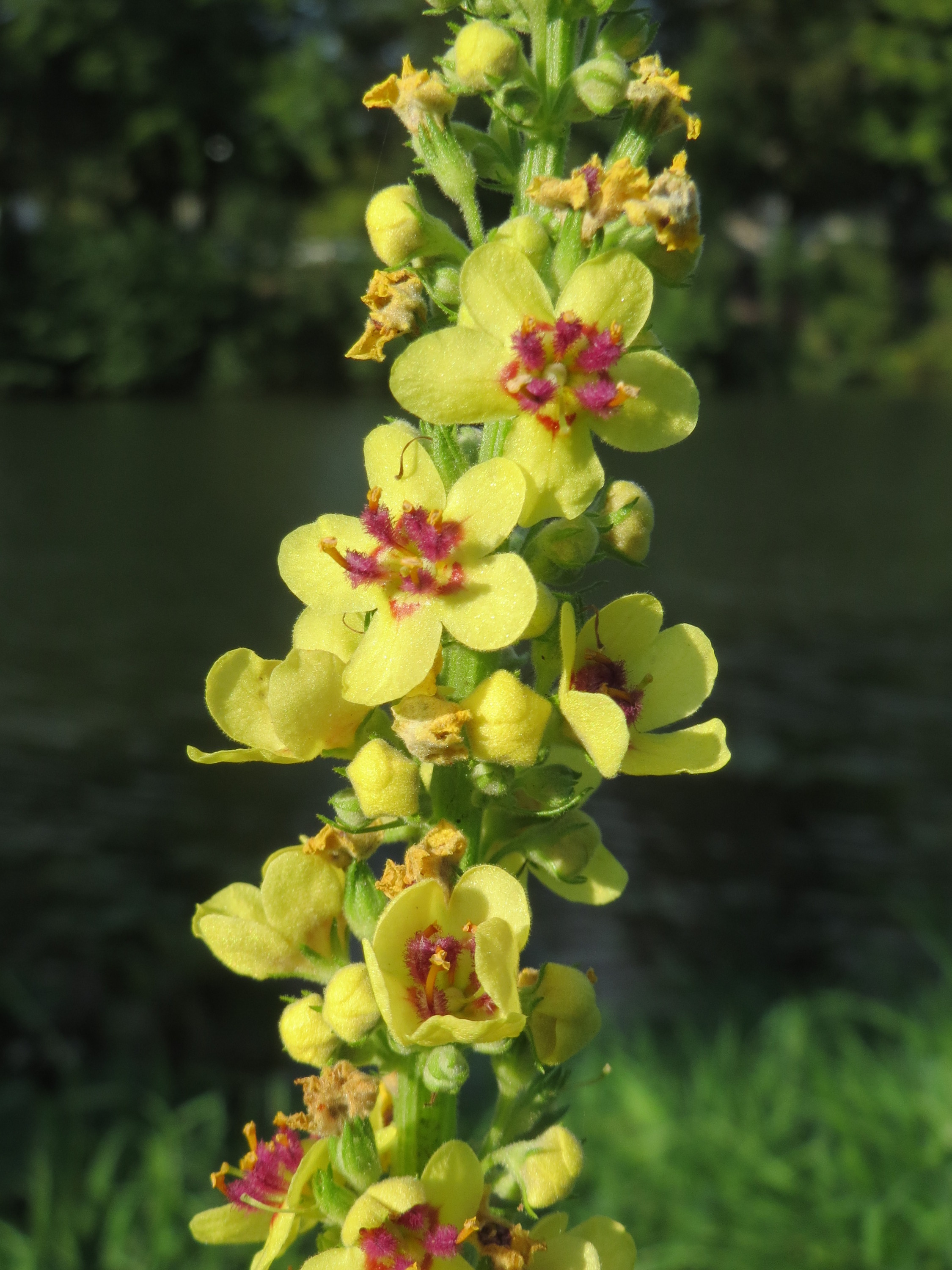 Schwarze Königskerze (Verbascum nigrum) an der Saar in Saarbrücken